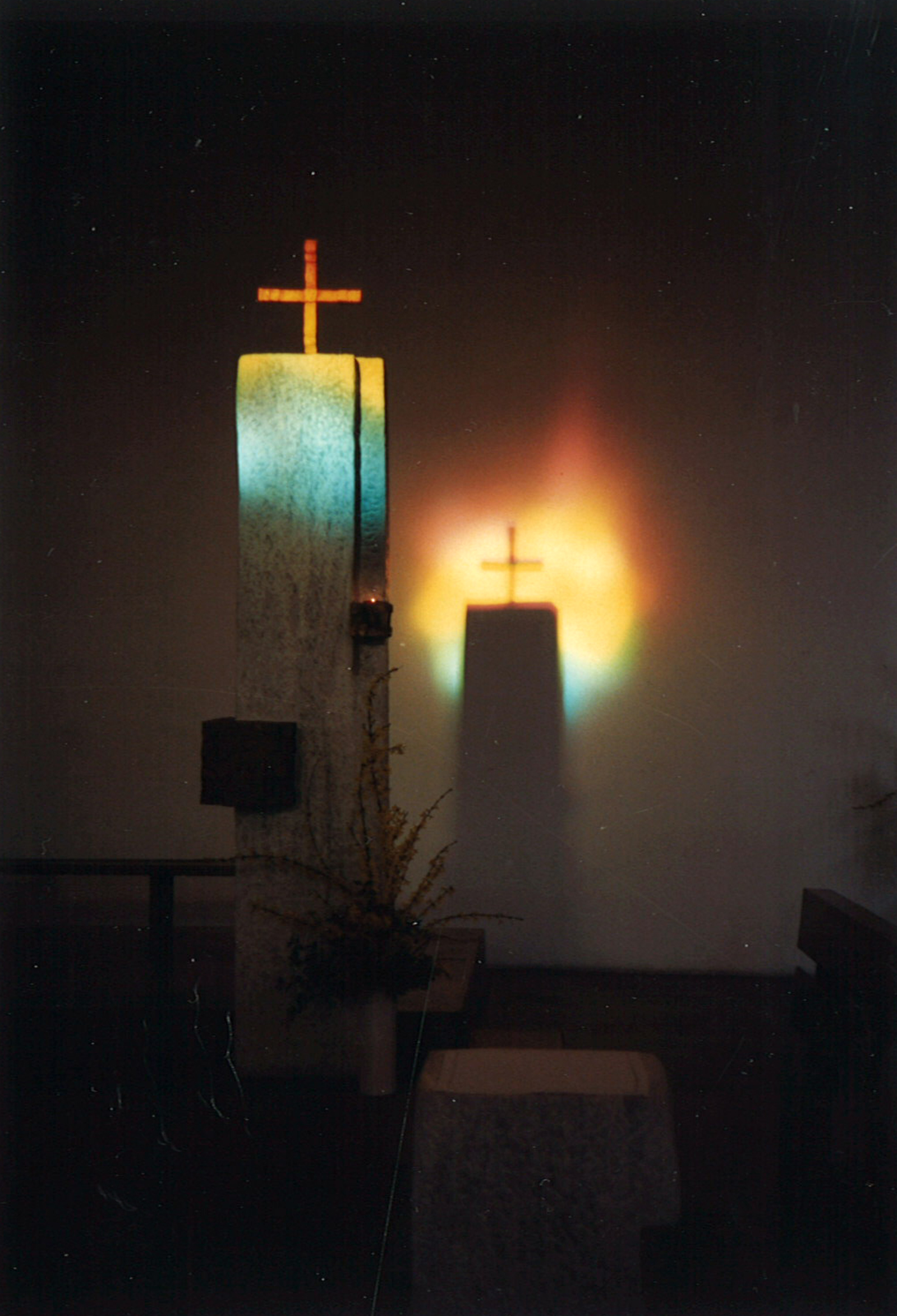 Kloster Ilanz, Tabernakel der Klosterkirche